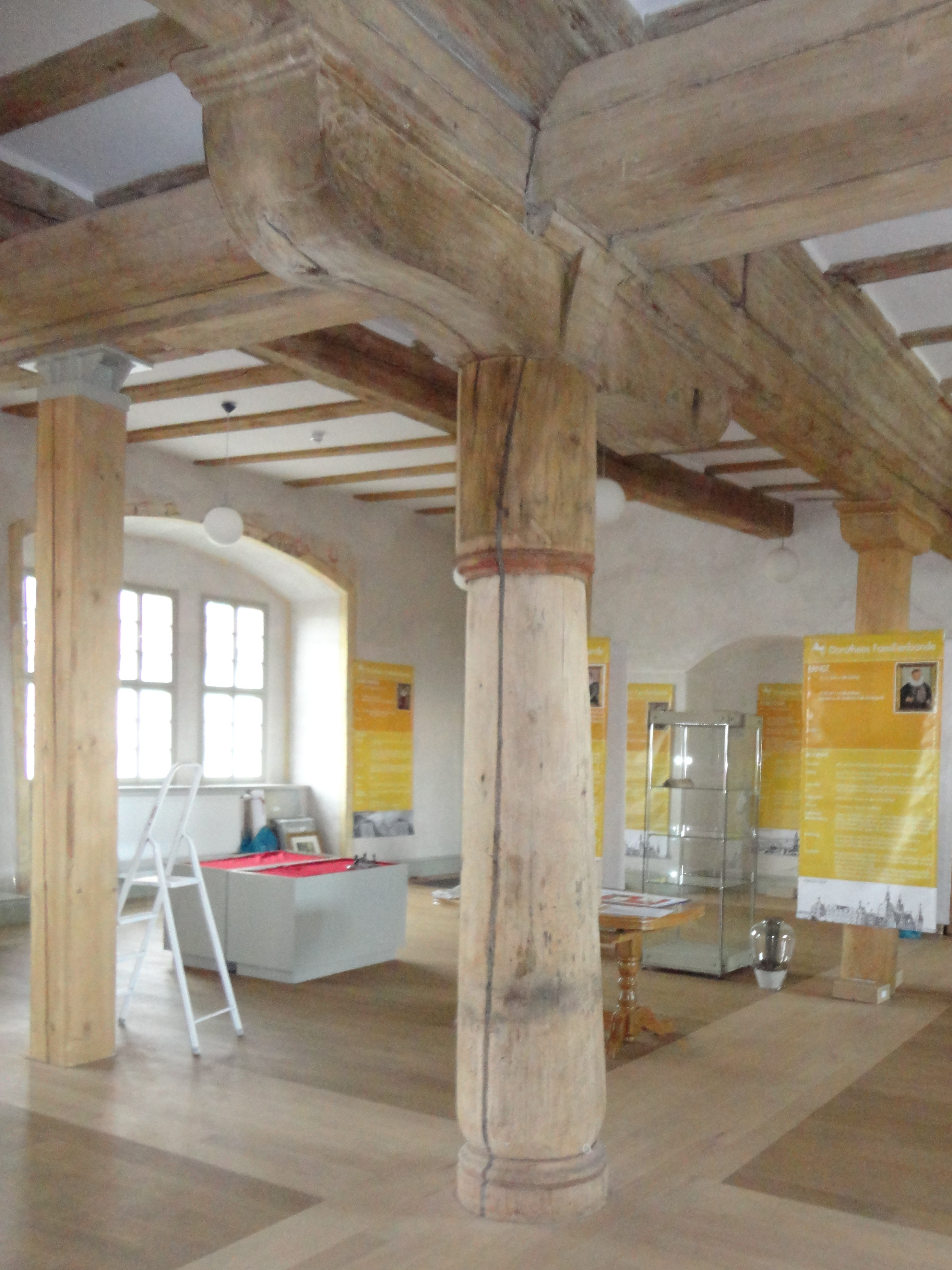 Saal mit den alten Deckenbalken im renovierten Schloss in Heringen/Helme, der für Ausstellungen genutzt wird.